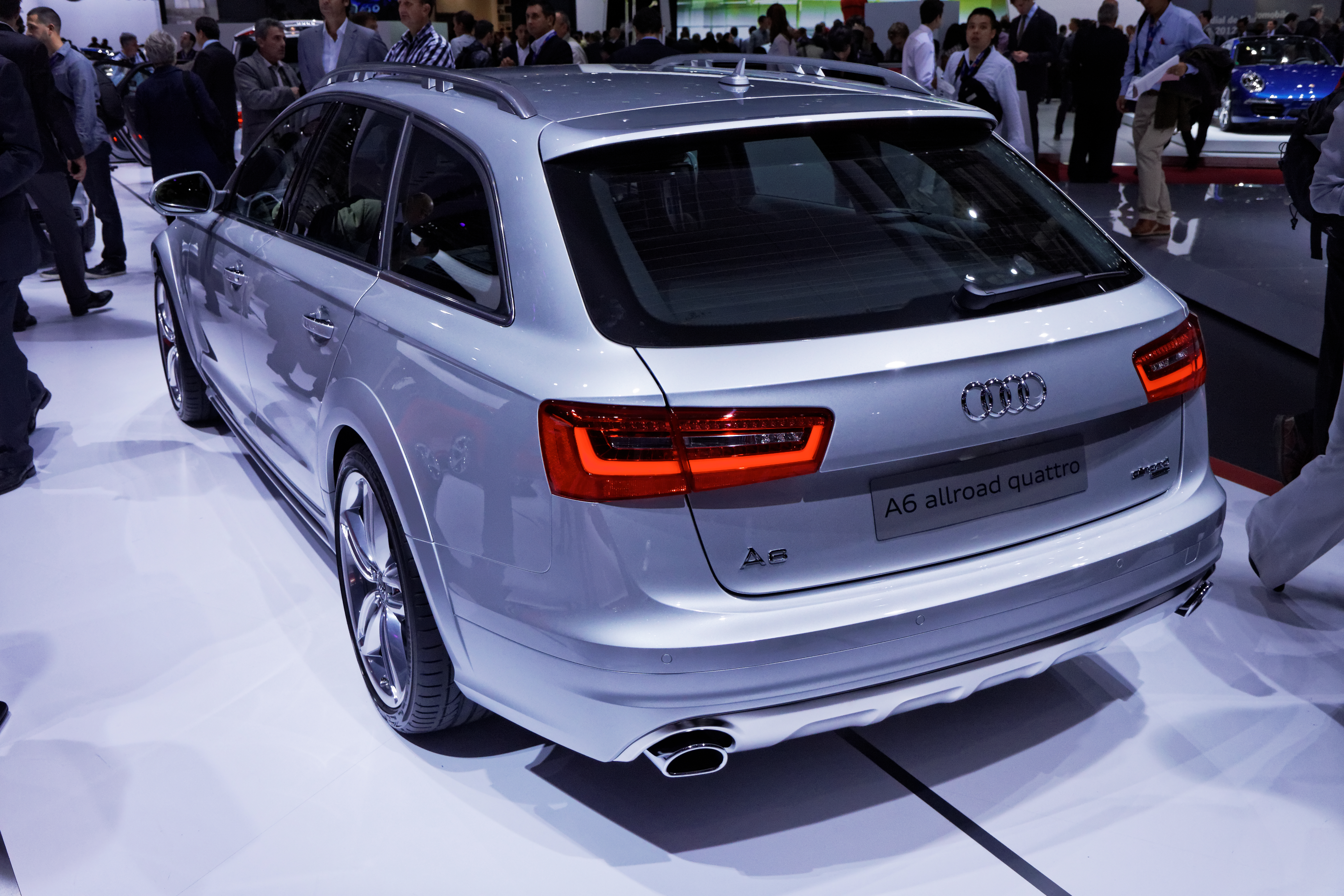 Une Audi A6 présentée lors du Mondial de l'Automobile de Paris 2012.